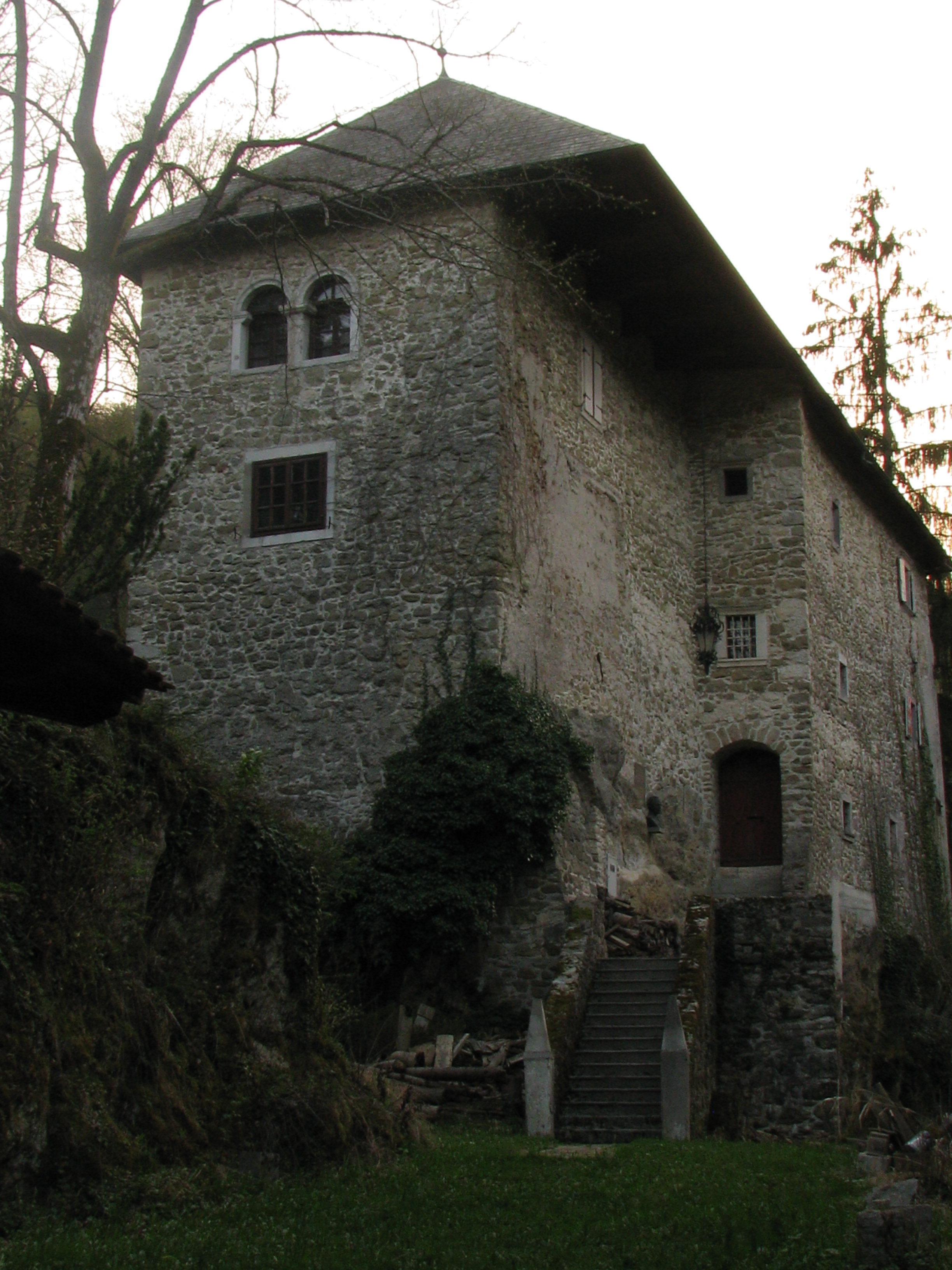 Grad Kolovrat